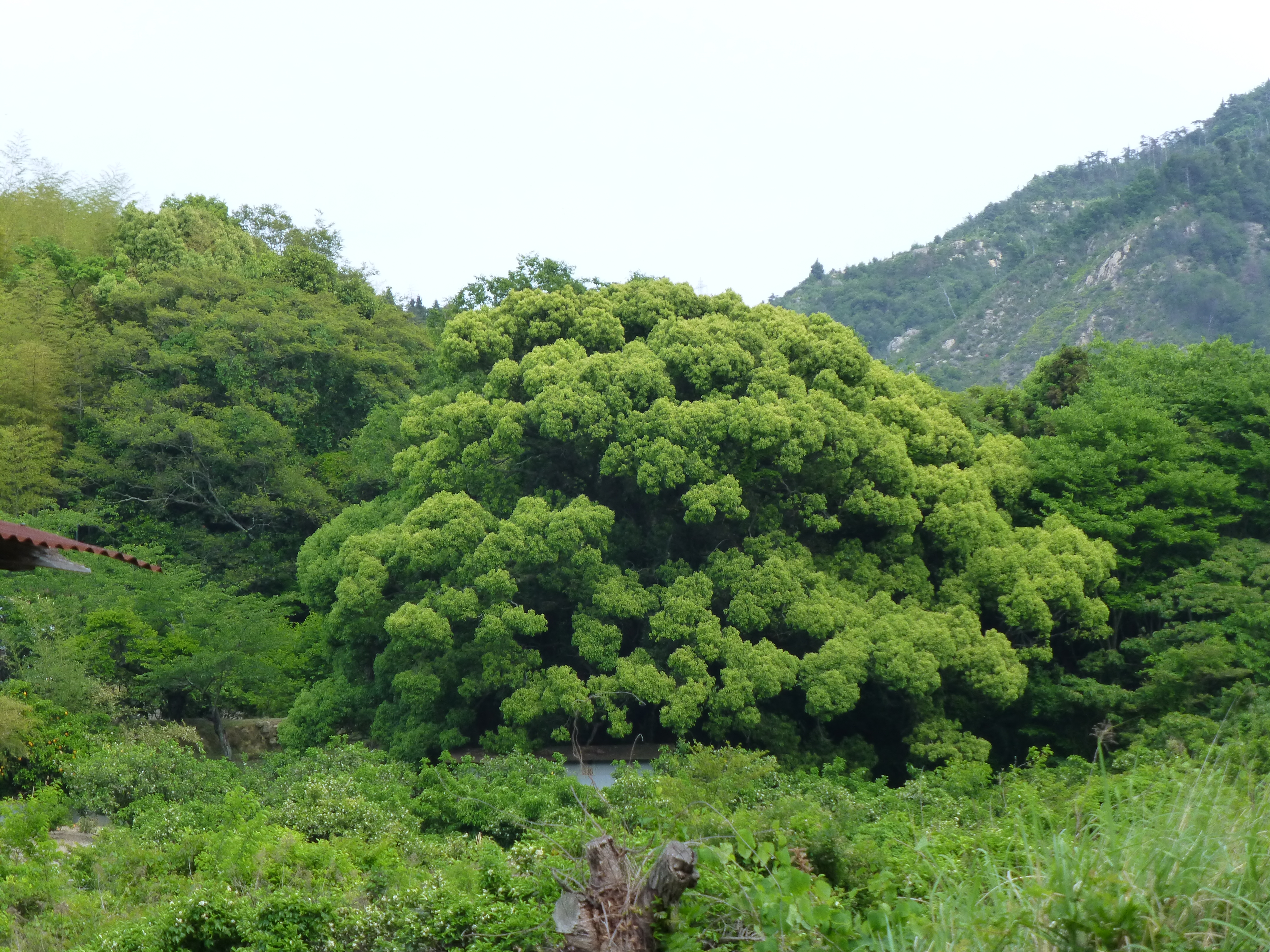 大山祇神社 生樹の御門